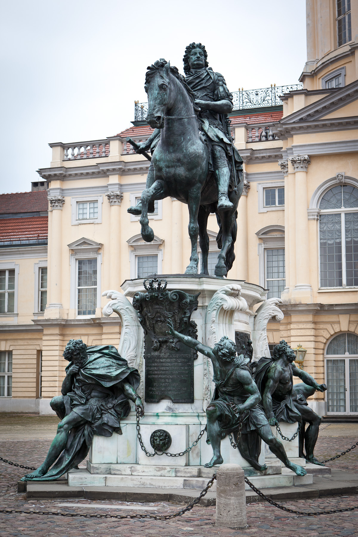 Berlin